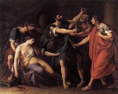 Le Serment de Brutustitle QS:P1476,fr:"Le Serment de Brutus" label QS:Lfr,"Le Serment de Brutus"